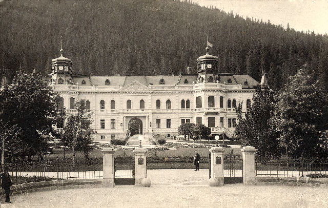 Фото палацу баронів Грьодлів (Сколе) (початок 1930-х років)